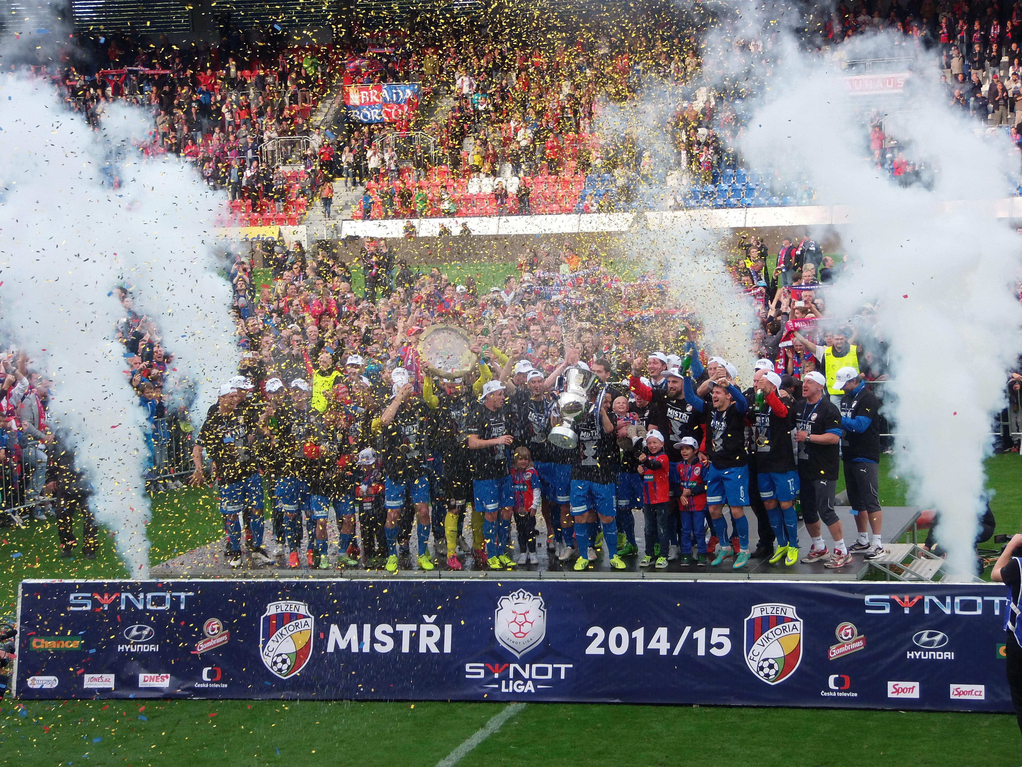 FC Viktoria Plzeň - oslavy titulu v české lize, květen 2015 - 06